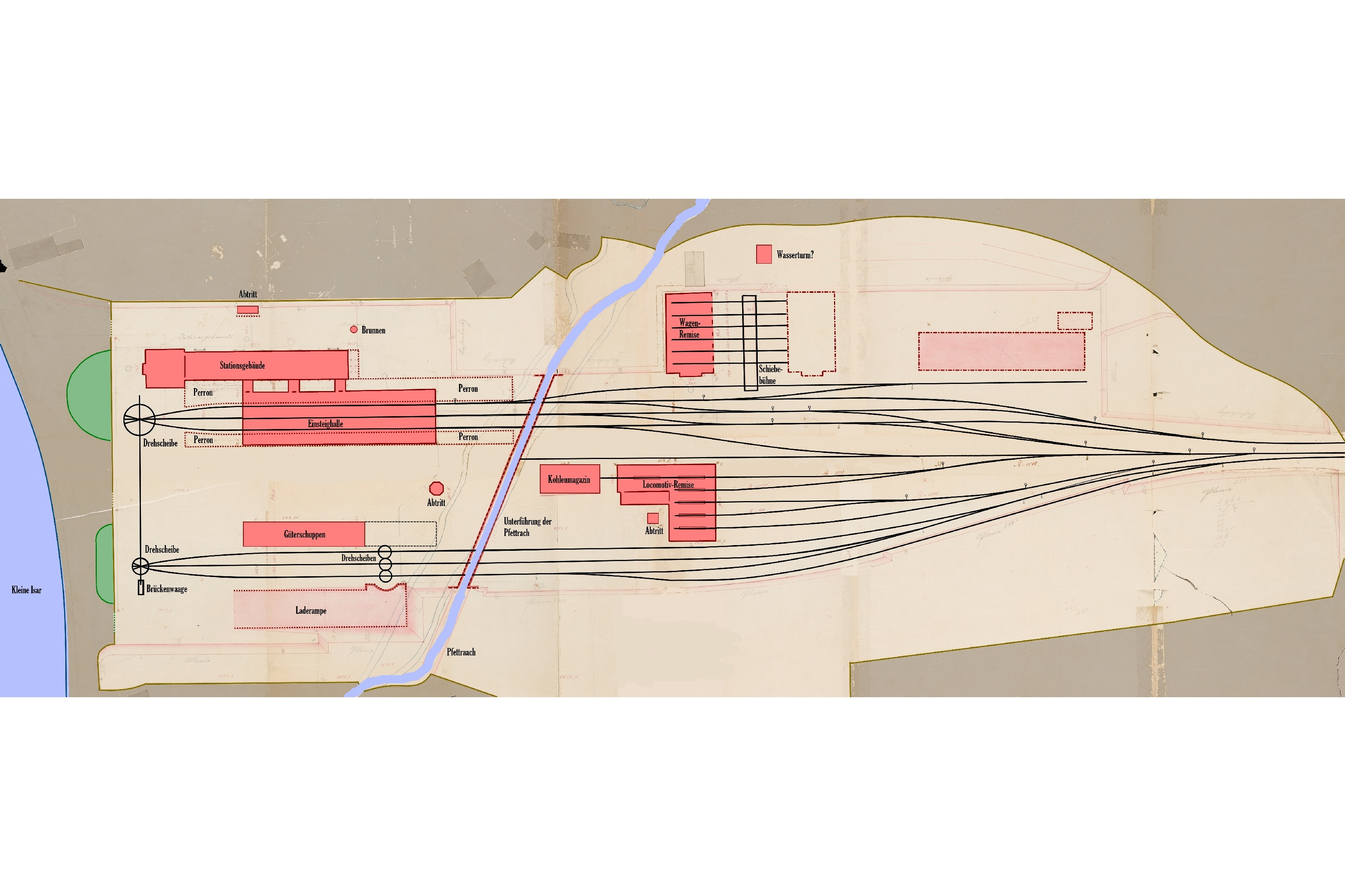 Nachgezeichneter Gleisplan mit Gebäuden und Bezeichnungen